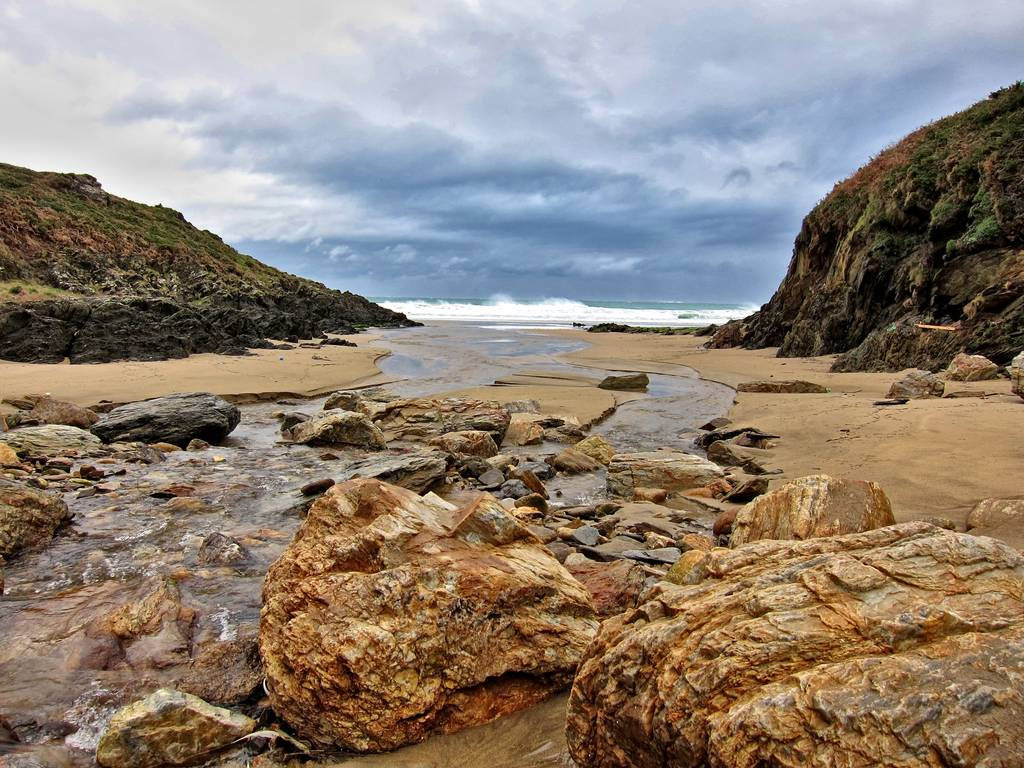 Praia de Riás en Cambre, Malpica.